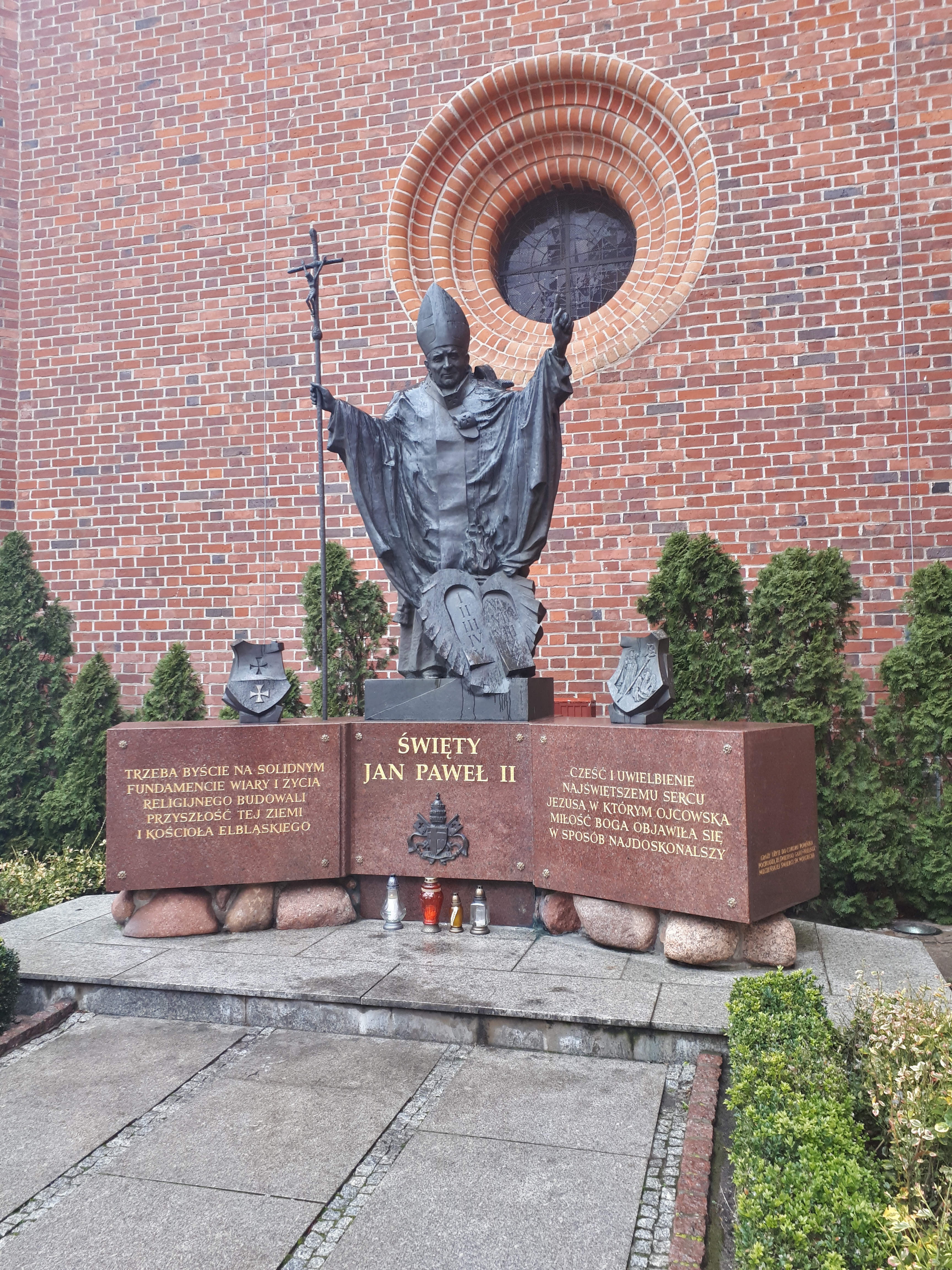 Pomnik świętego Jana Pawła II przy katedrze elbląskiej